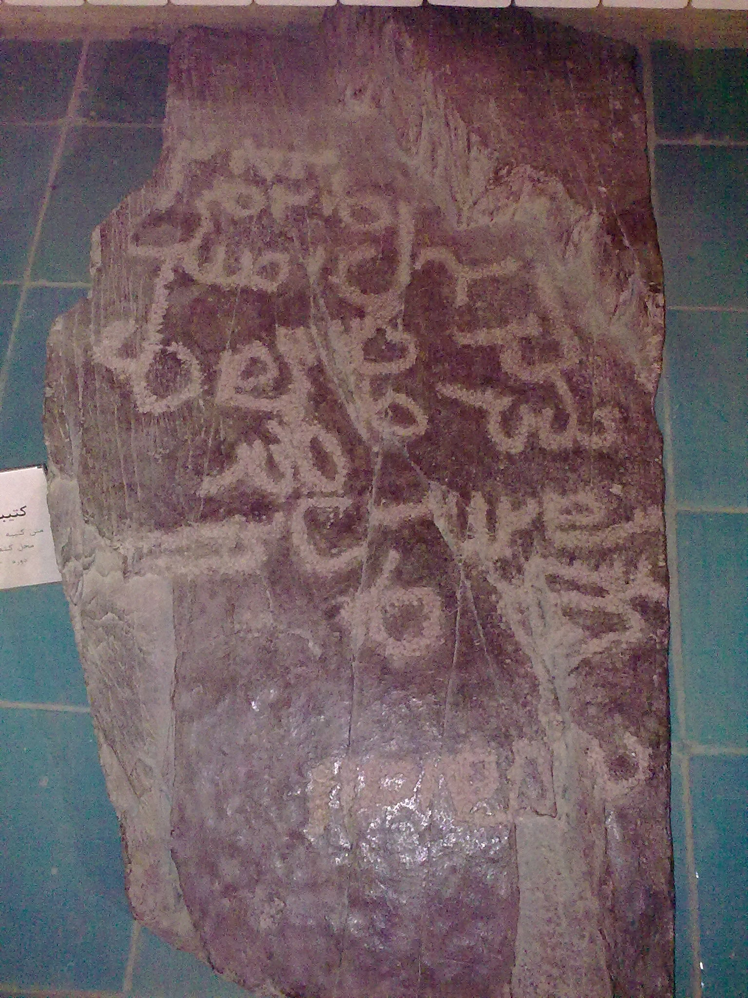 سنگ نبشته پهلوی